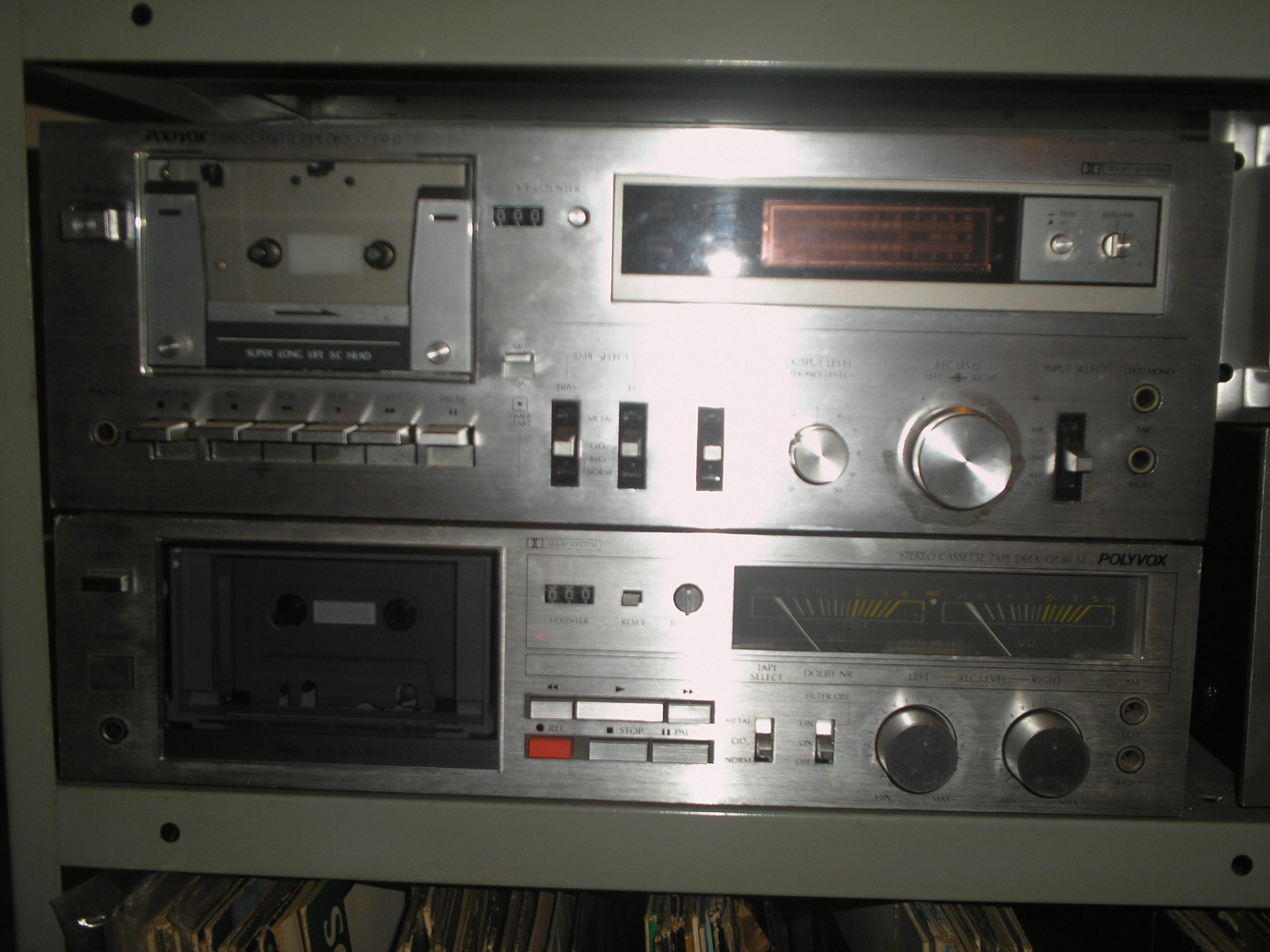 Fotos tirados por mim mesmo de meus magnetofones Polyvox CP80M, aparelhos de som. Autorizo o uso livre para qualquer finalidade.